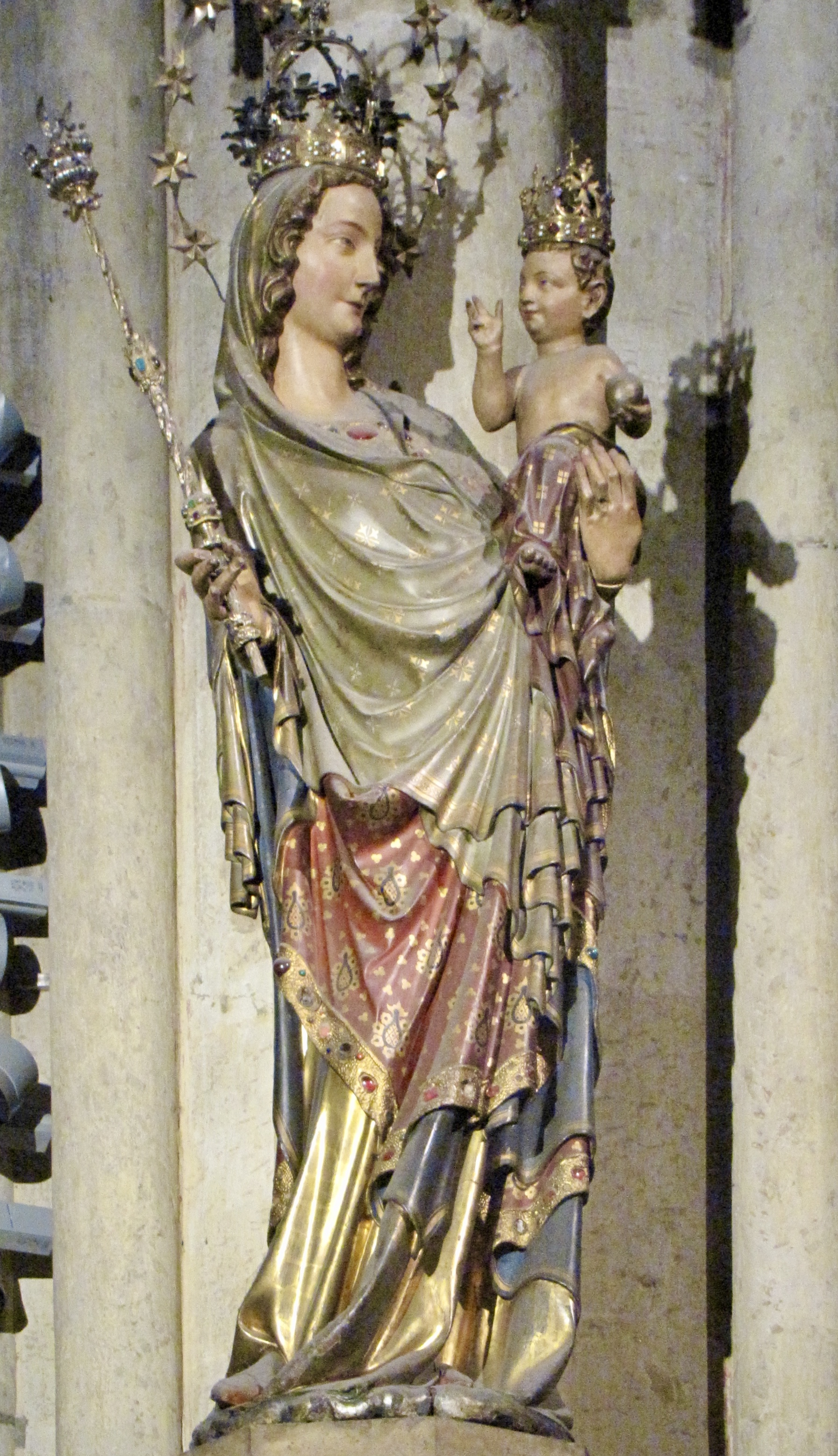 Mailänder Madonna: hochgotisch, um 1280/90, Werk der Kölner Dombauhütte. ältestes Mariengnadenbild des gotischen Domes. Farbfassung sowie Szepter und Krone von einer Restaurierung um 1900.